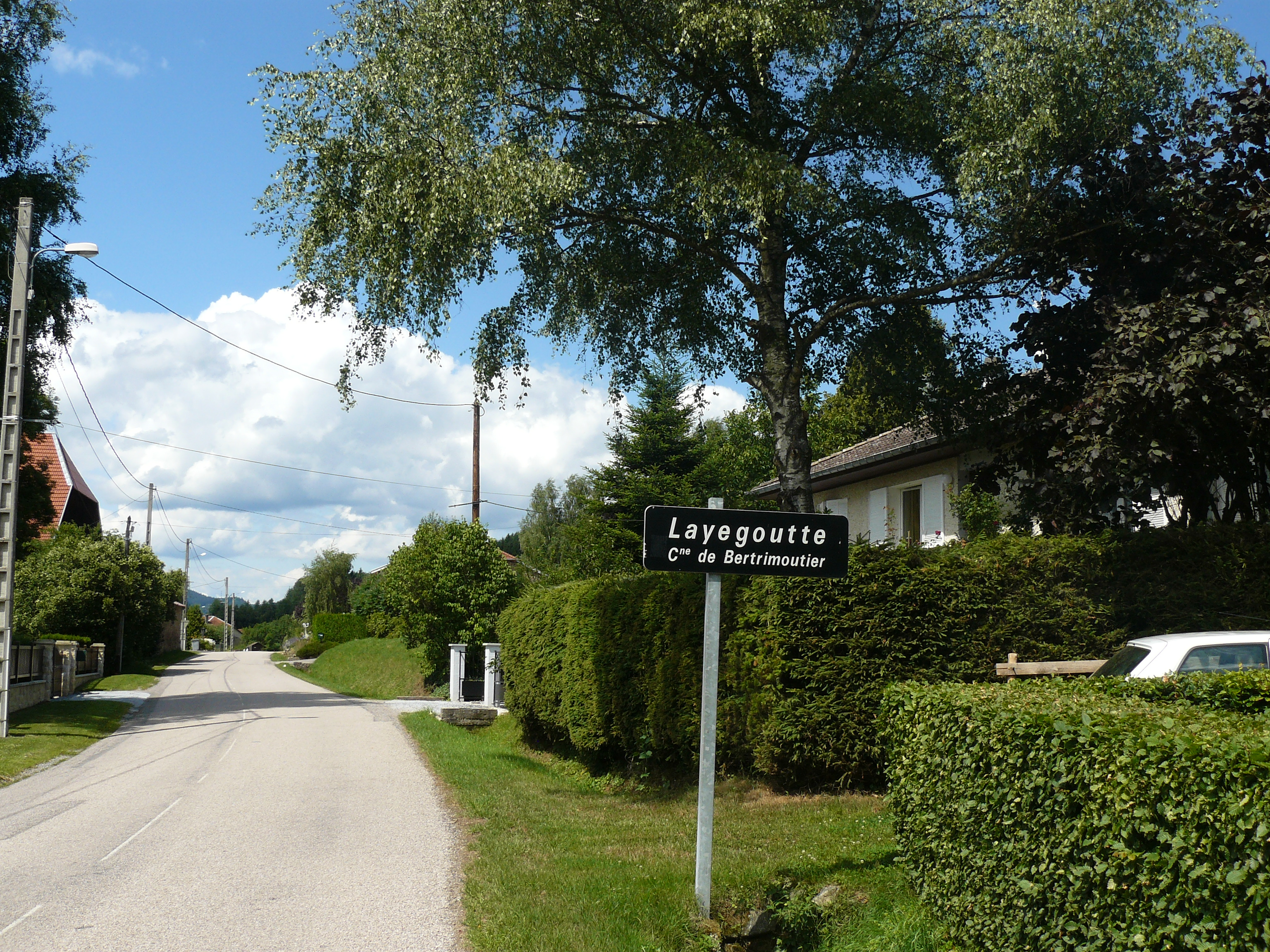 Hameau de Layegoutte à Bertrimoutier